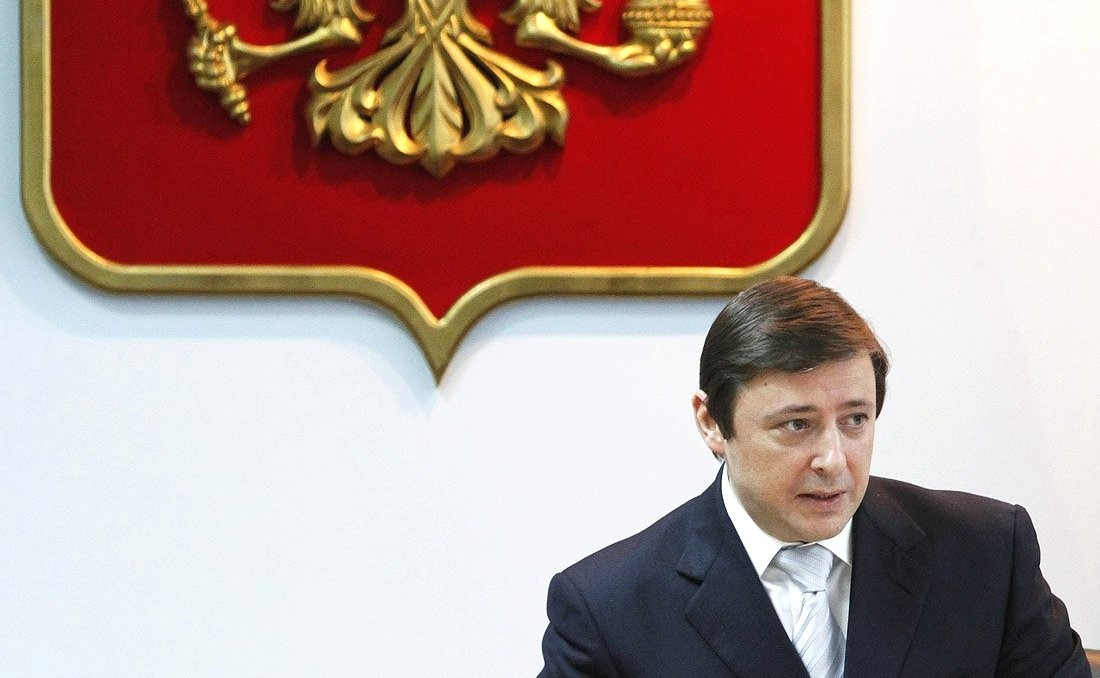 Сергей Нарышкин представил главам регионов, входящих в Северо-Кавказский федеральный округ, полномочного представителя Президента Александра Хлопонина